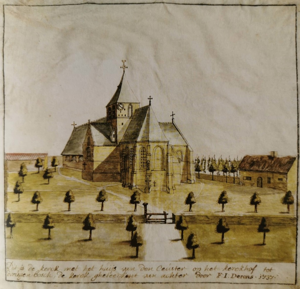 Derons, De Sint-Niklaaskerk van Drogenbos, 1737 (Museum NBB)